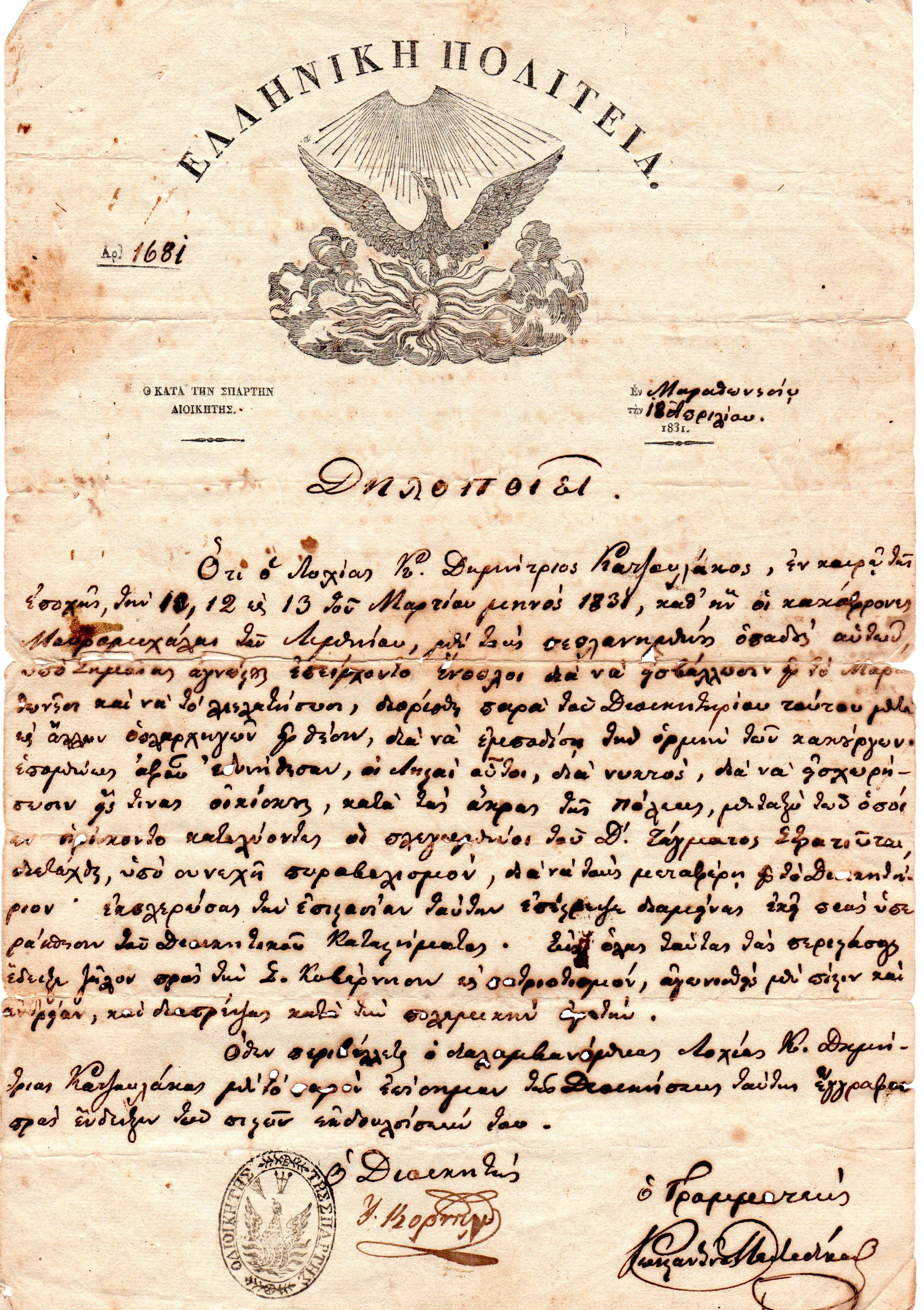 Βεβαίωση για τη συμμετοχή του Δημητρίου Κατσουλάκου στην υπεράσπιση του Γυθείου (1831)